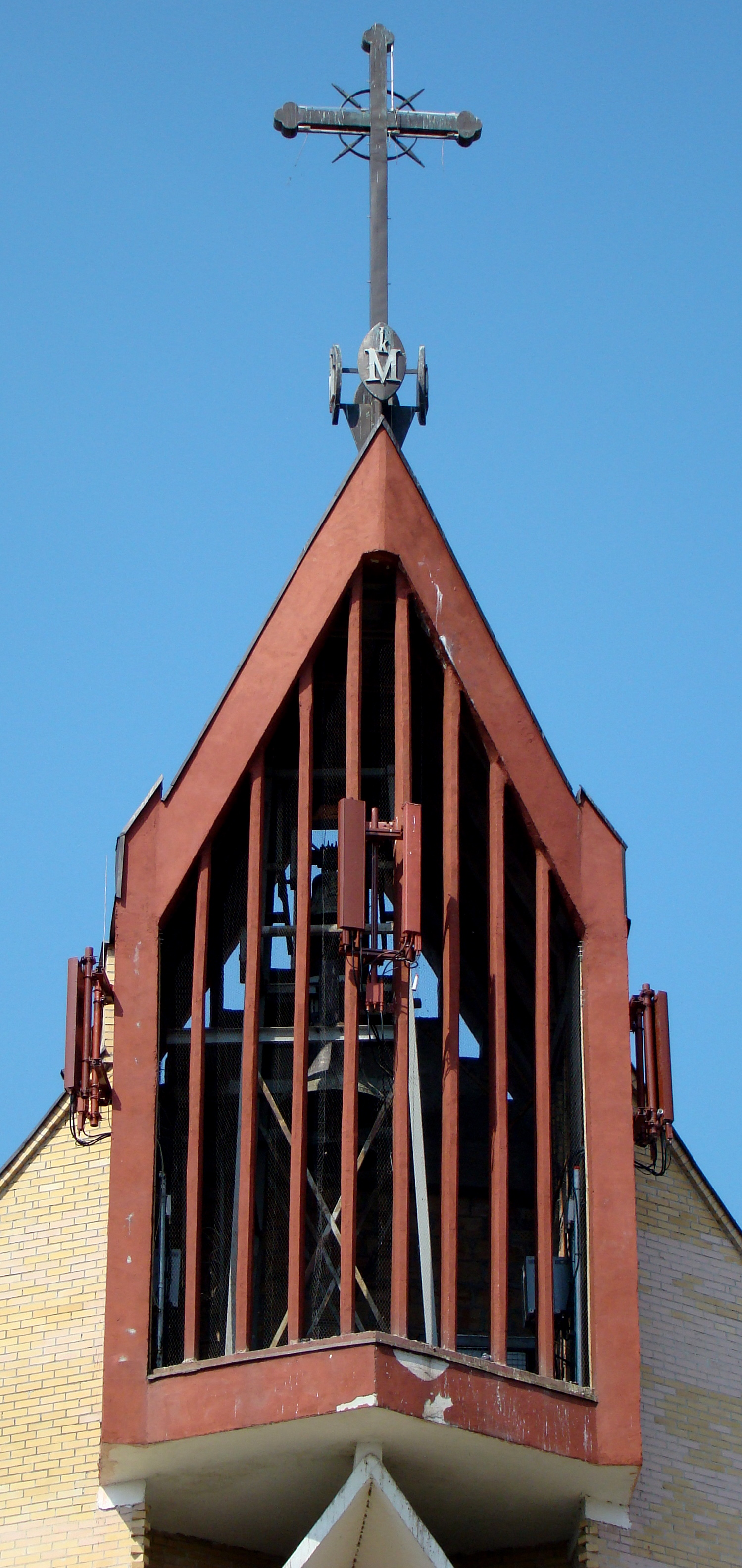 Kościół pw. św Kazimierza Królewicza w Policach (dzwonnica), Polska